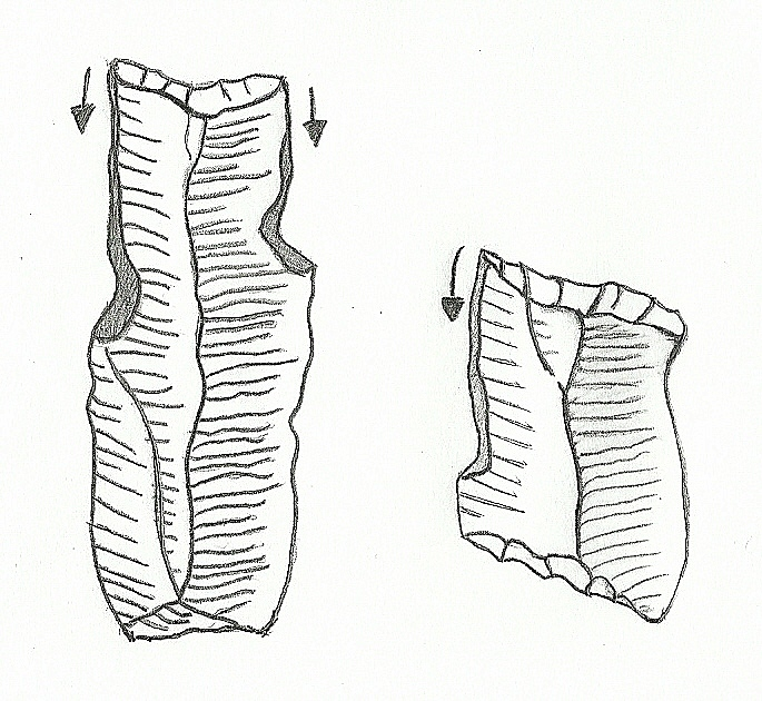 Noailles-Stichel (Umzeichung)